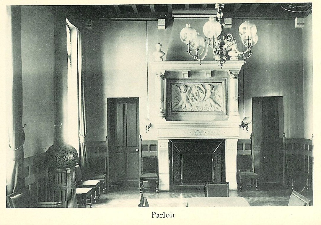 Parloir du lycée Molière (Paris)